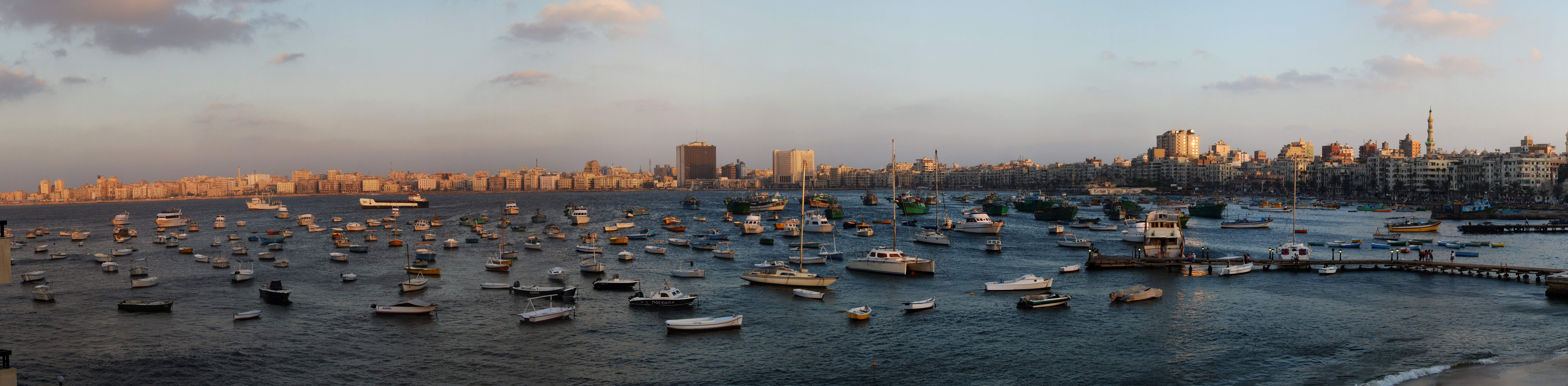 panorama d'Alexandrie